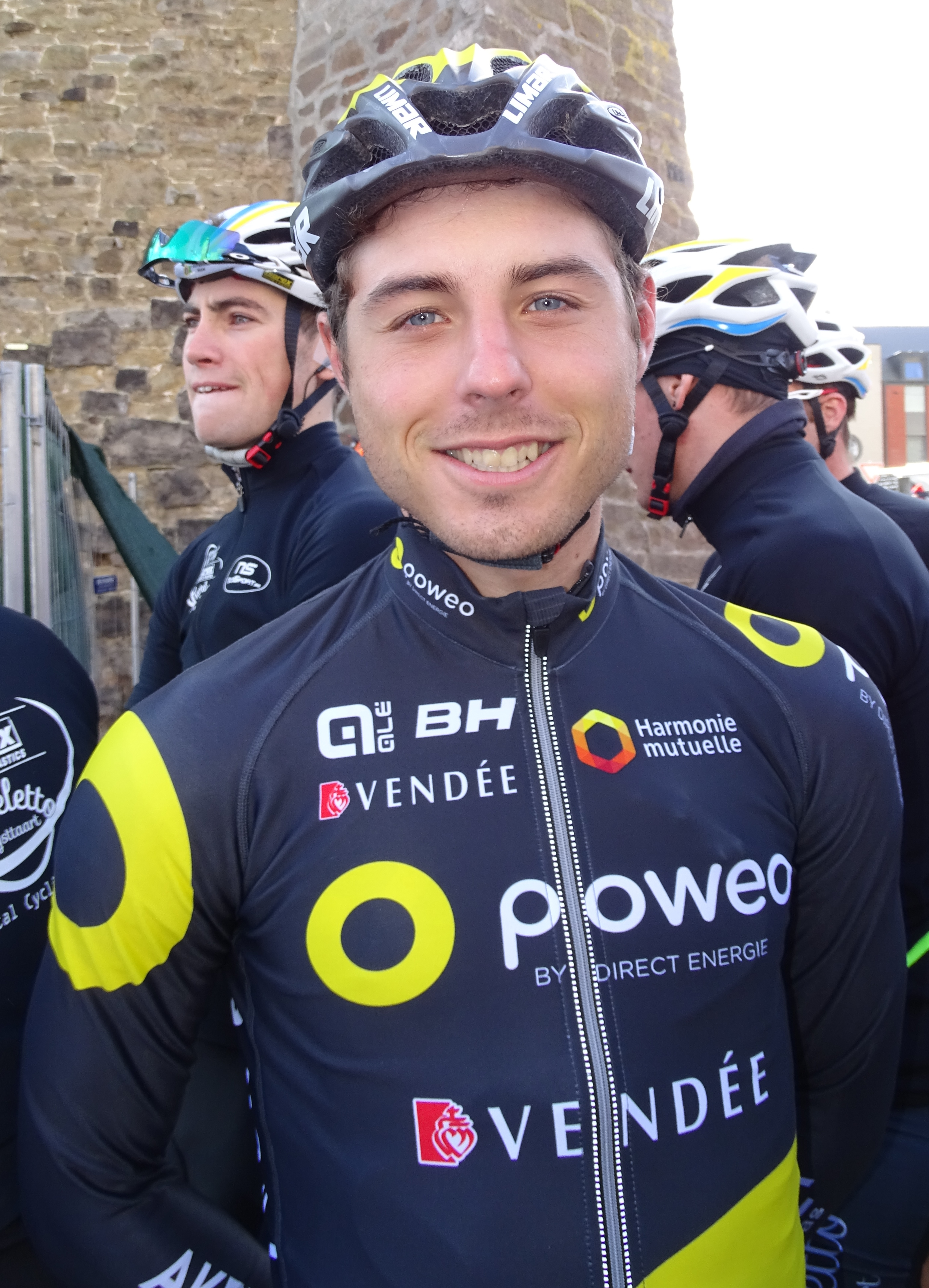 Reportage réalisé le mercredi 2 mars à l'occasion du départ du Samyn des Dames 2016 et du Samyn 2016 à Quaregnon, Belgique.